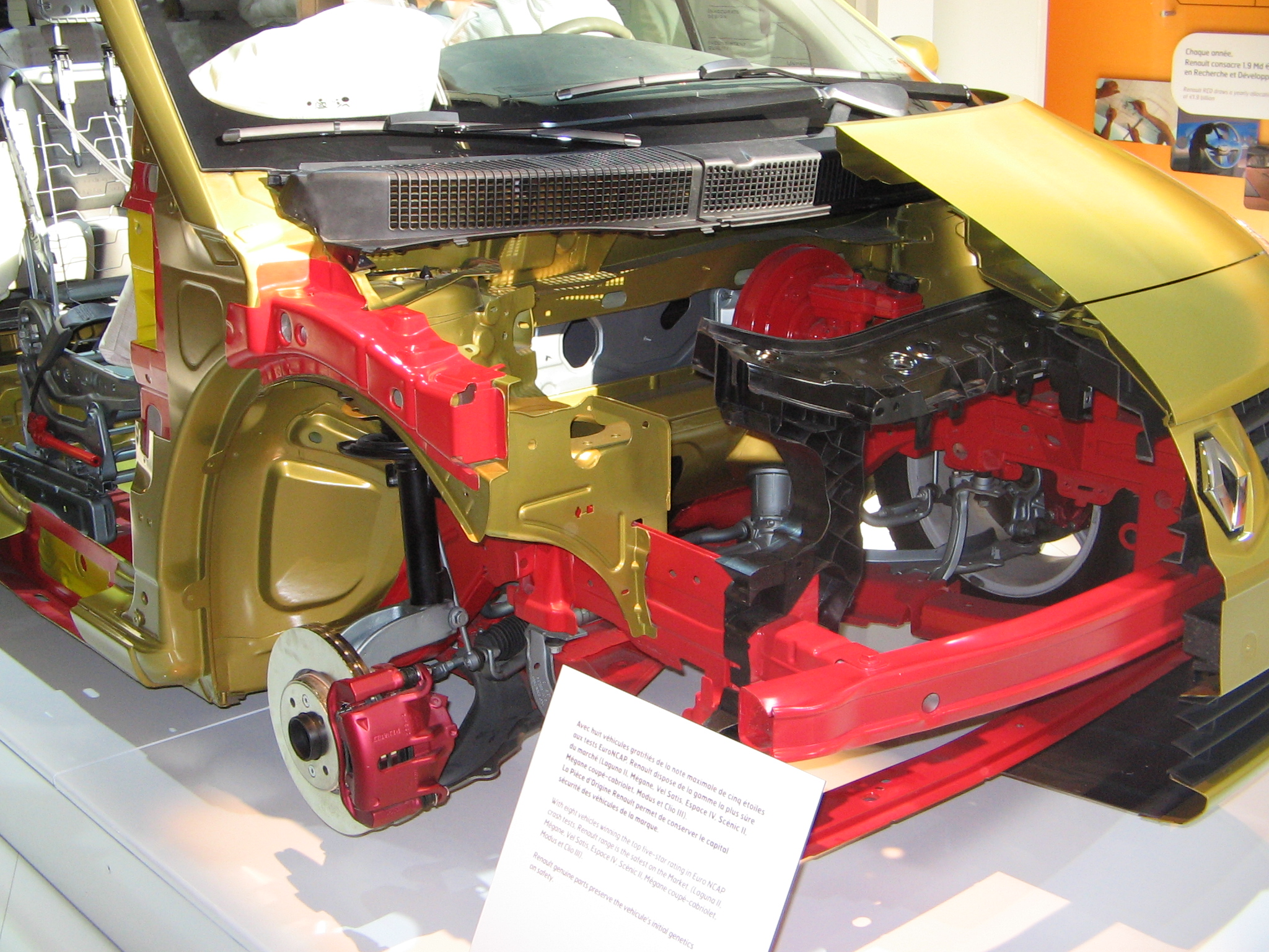 Avant découpé d'une Renault Scénic. Photo prise durant le salon Equipauto de Paris 2005.